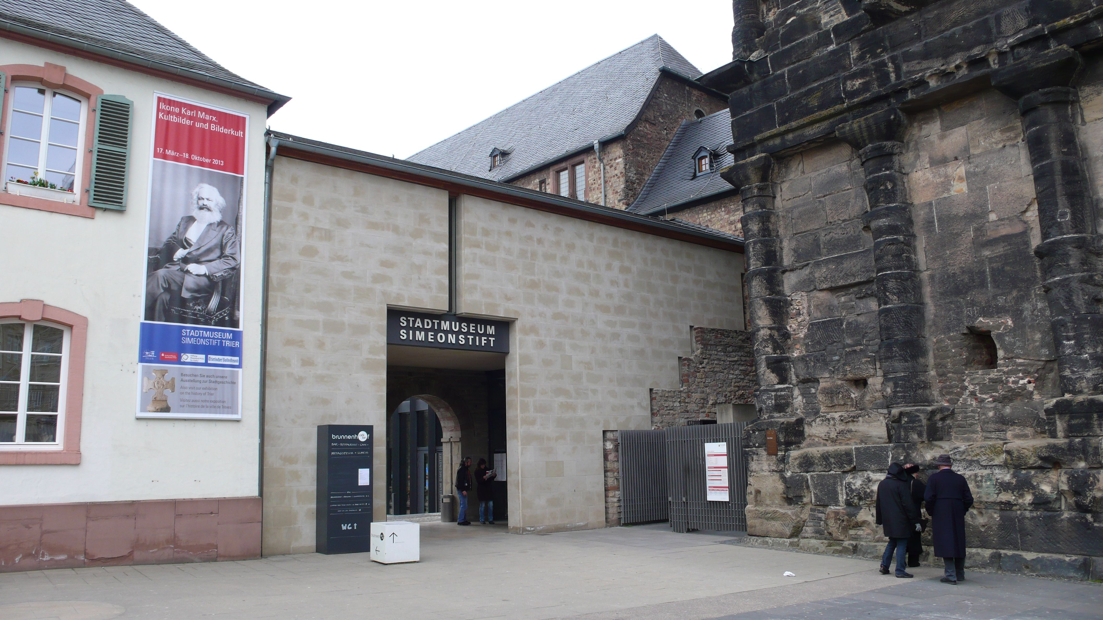 Das Stadtmuseum Simeonstift in Trier liegt direkt neben der Porta Nigra.